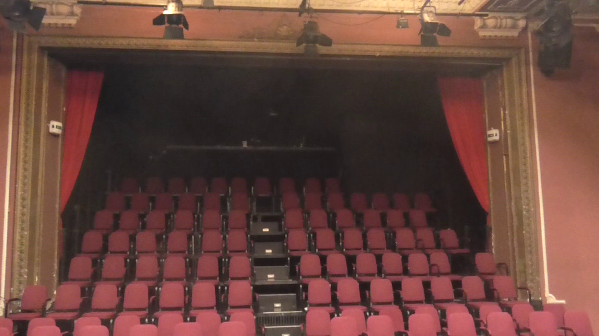 A Bethlen Téri Színház nézőtere 2015. június 15-én